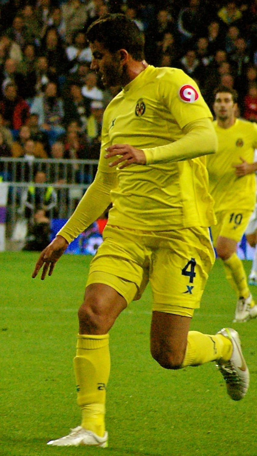 El jugador groguet Mateo Musacchio